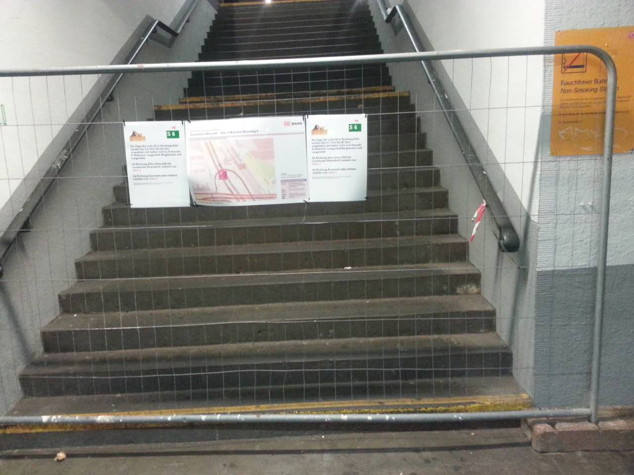 Benrather Bahnhof, Bauzaun zur Sperrung der S-Bahn-Gleise